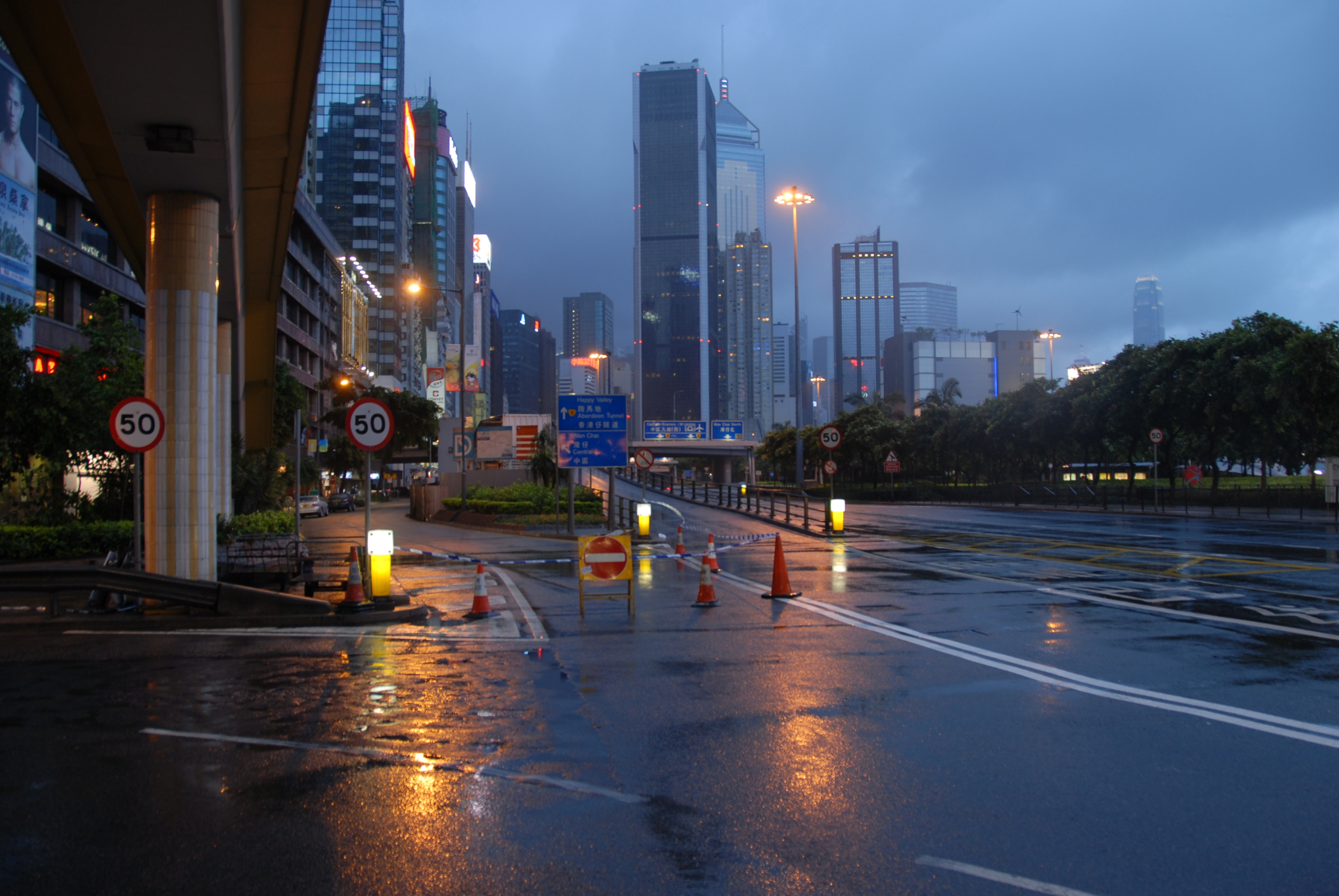 Hong Kong during Tropical Storm Nuri (2008)'s passage